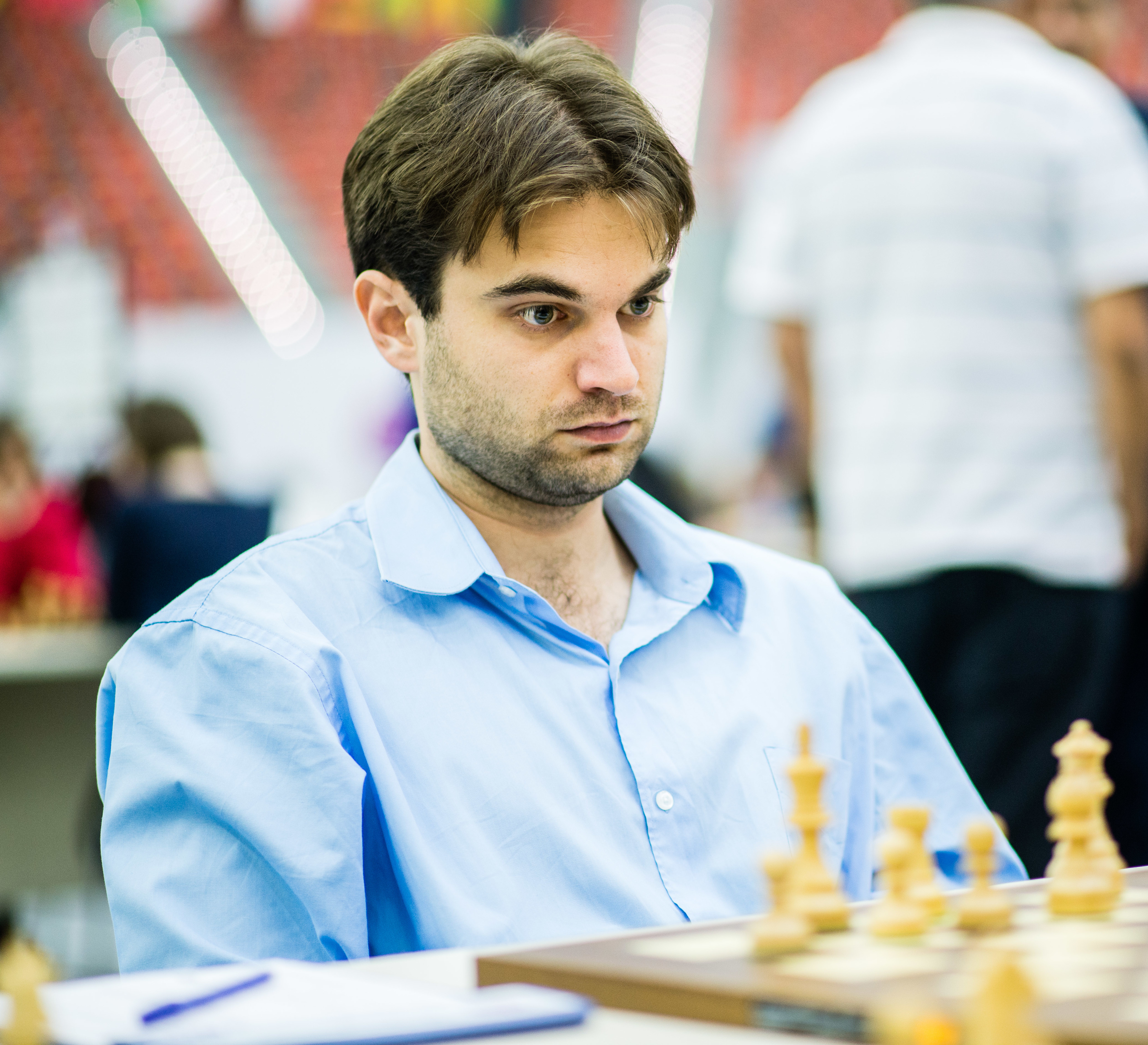 Shankland Samuel